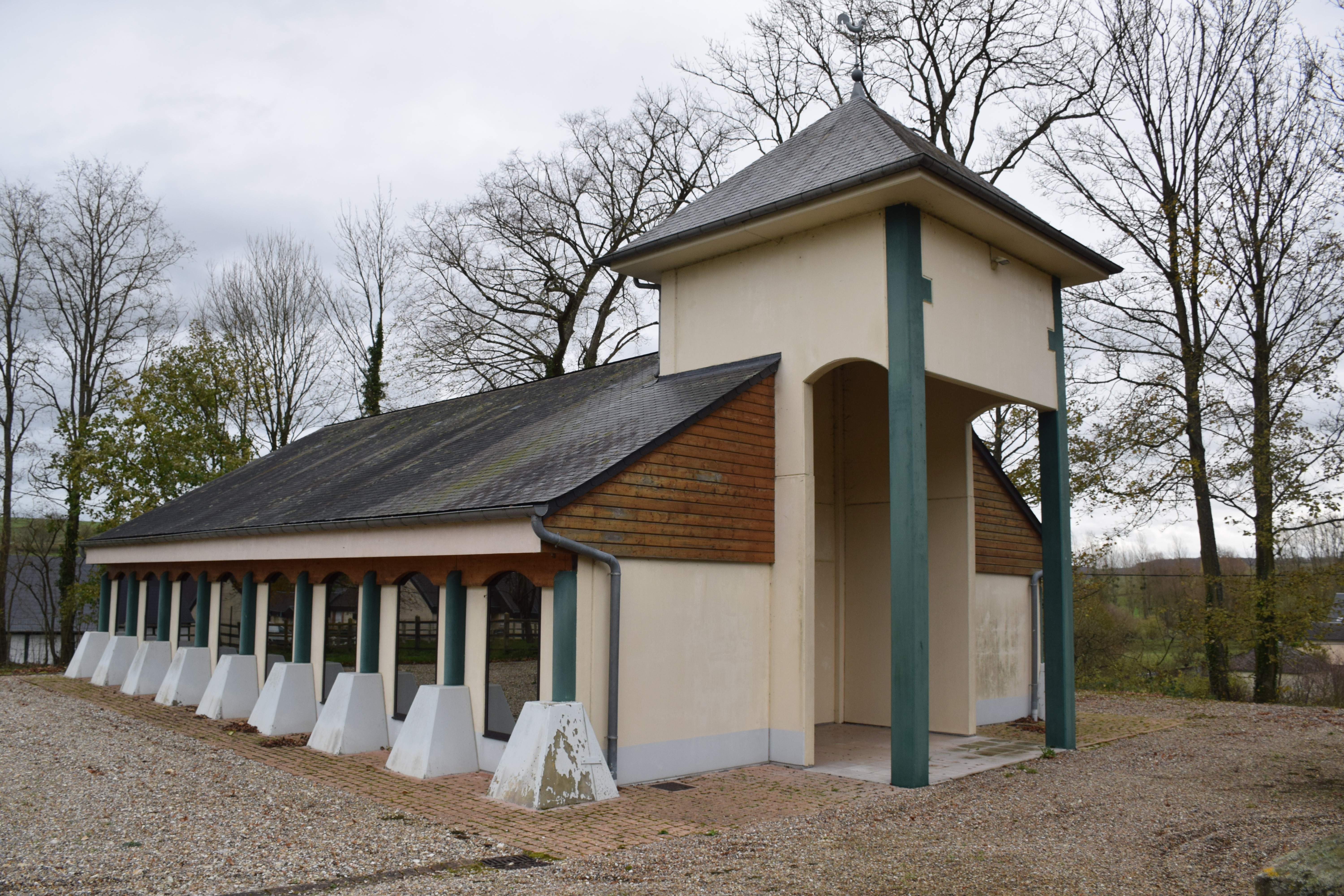 L'église